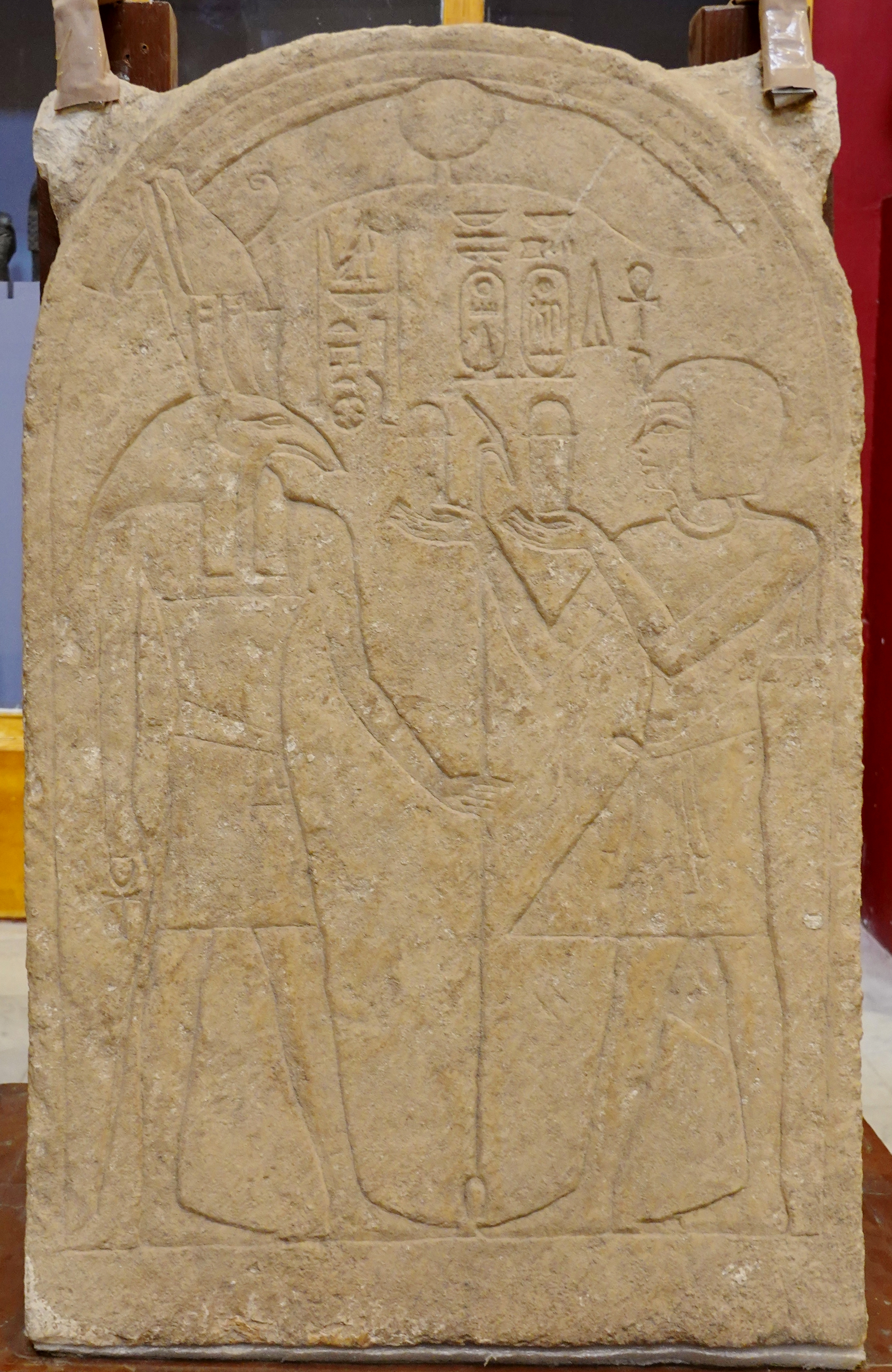 Stele aus Kalkstein mit der Darstellung des Königs Ramses I. vor dem Gott Seth, ausgestellt im Ägyptischen Museum in Kairo, Ägypten